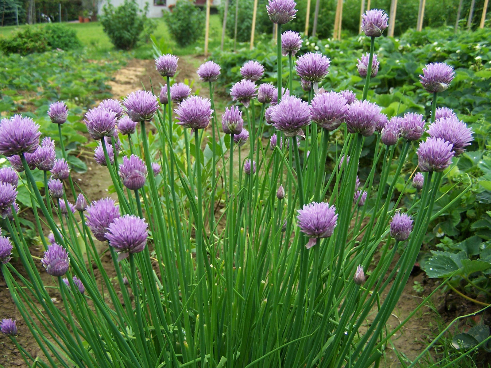 Allium schoenoprasum (pl. czosnek szczypiorek)